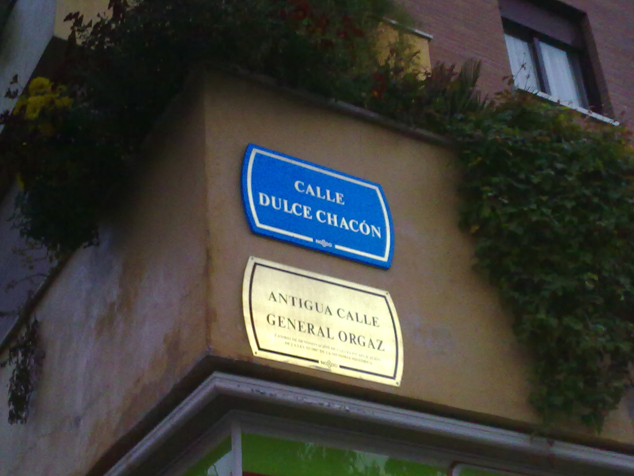 Calle en la ciudad de Sevilla (Bami).